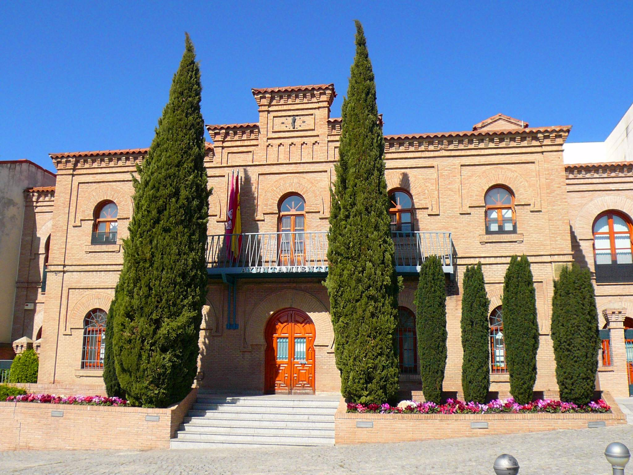 Ayuntamiento nuevo de Illescas (Toledo)